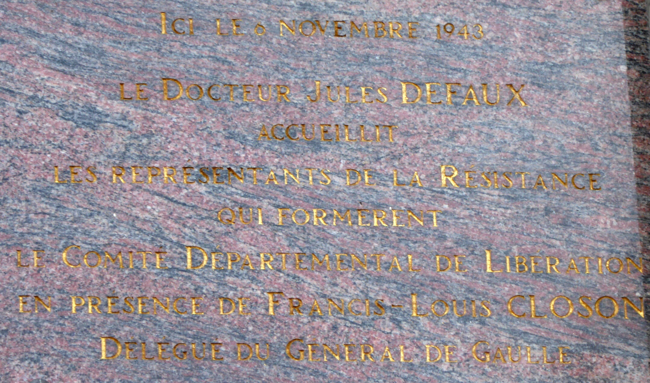 plaque commémorant la création du Comité Départemental de Libération du Nord au 56 rue Brûle Maison à Lille